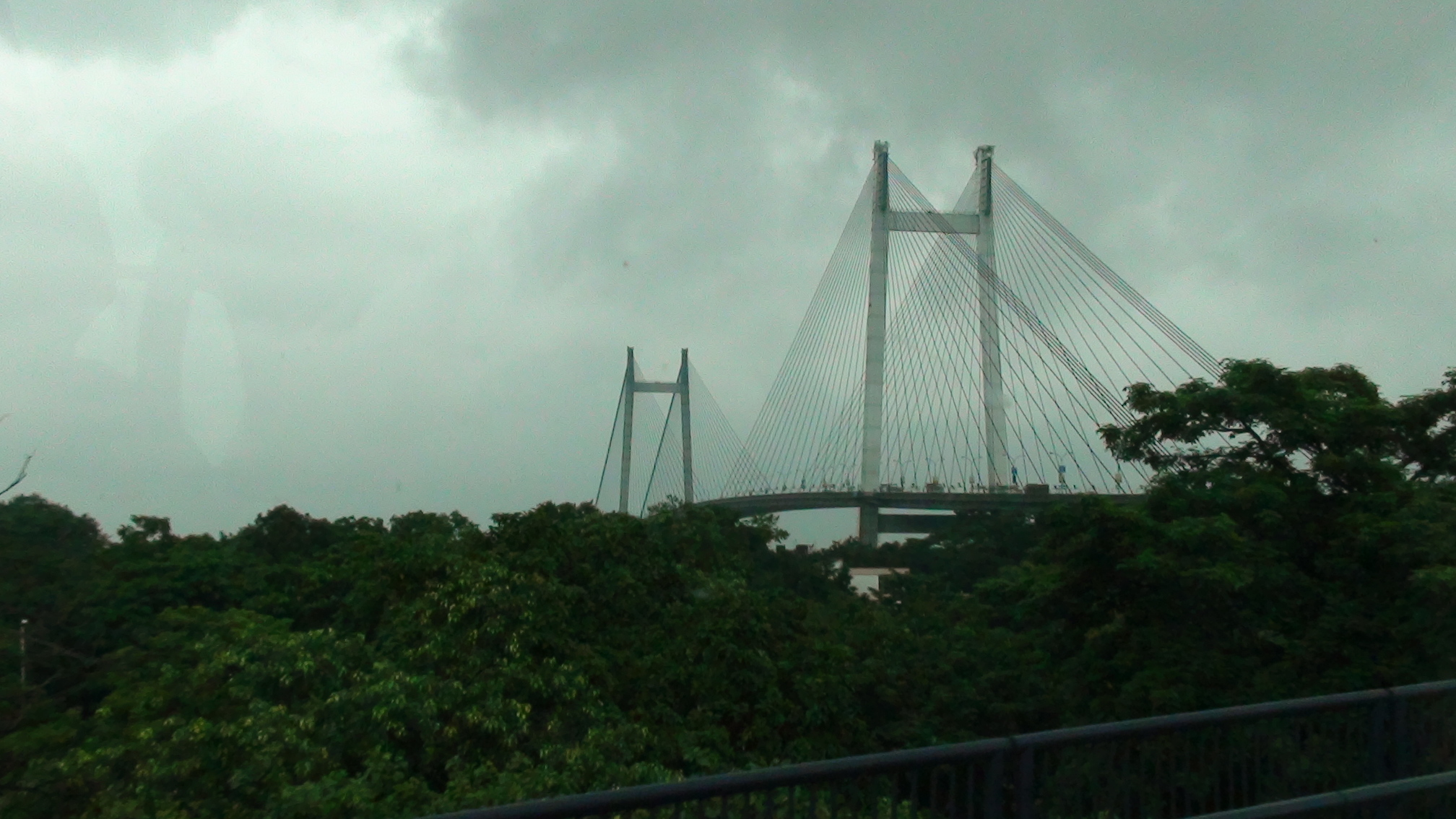 மழைக்காலத் தோற்றத்தில் ஹௌரா பாலம்